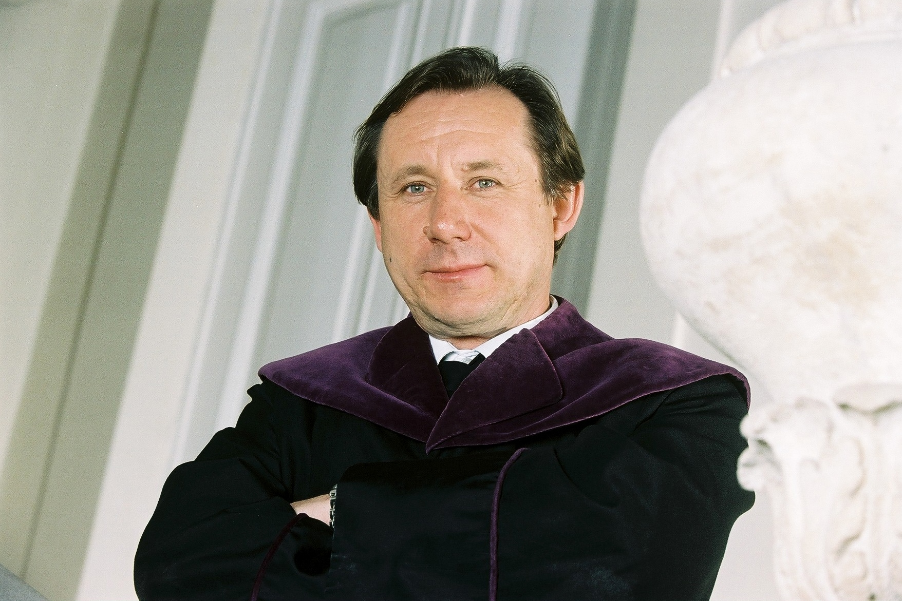 Dr. Wolfgang Burtscher ist ein österreichischer Jurist, hochrangiger EU-Beamter und ehemaliger Verfassungsrichter. Hier auf einer Aufnahme als Verfassungsrichter im Talar im Jahr 2005.